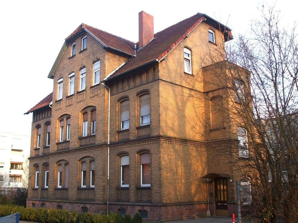 letztes erhaltenes Gebäude der Weberei